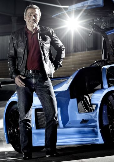 Roland Gumpert neben einem Gumpert apollo S